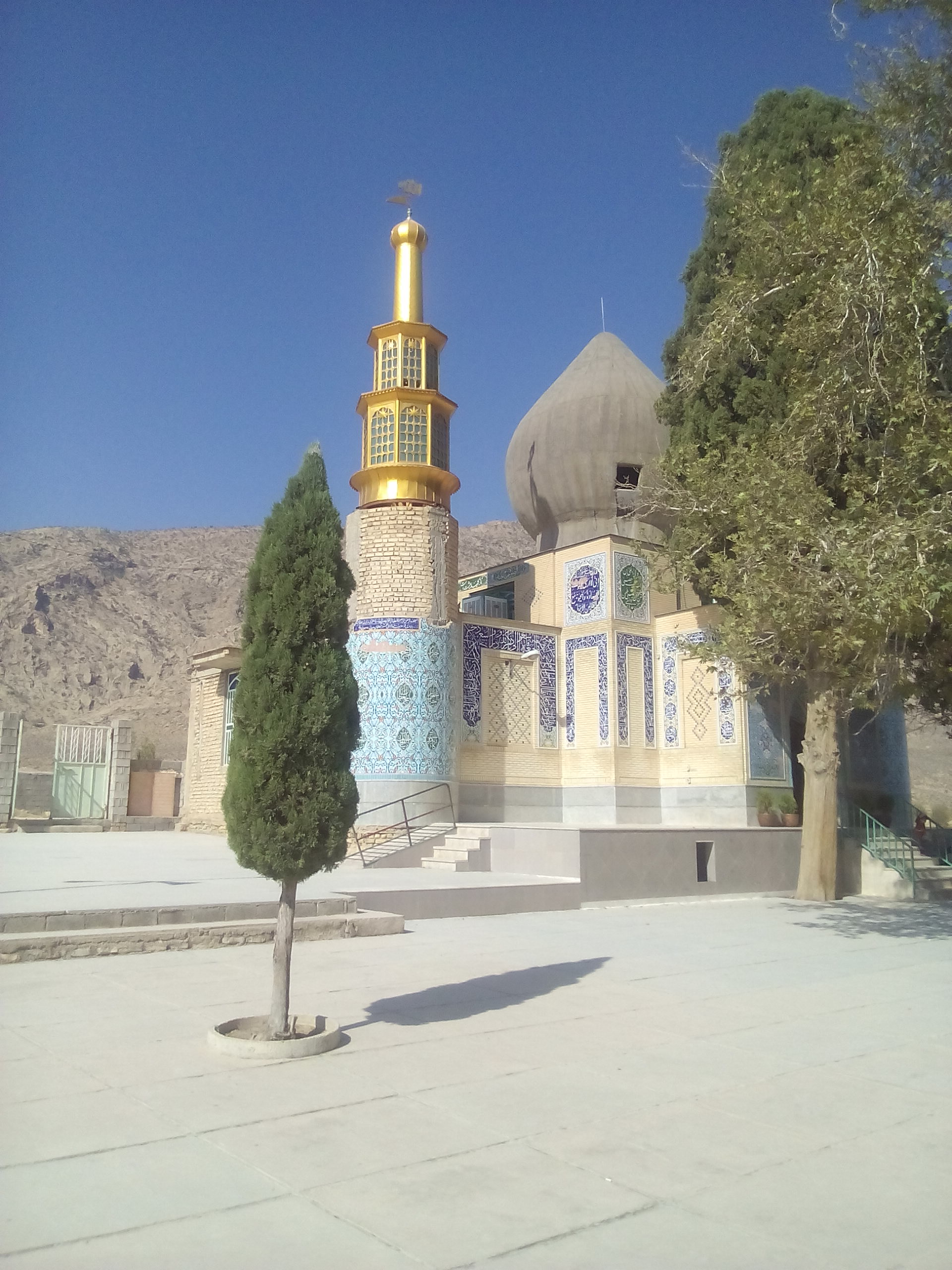 امامزاده شاه صفی الدین